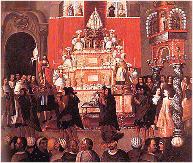 Cuadro de la serie del Corpus Christi del Cuzco